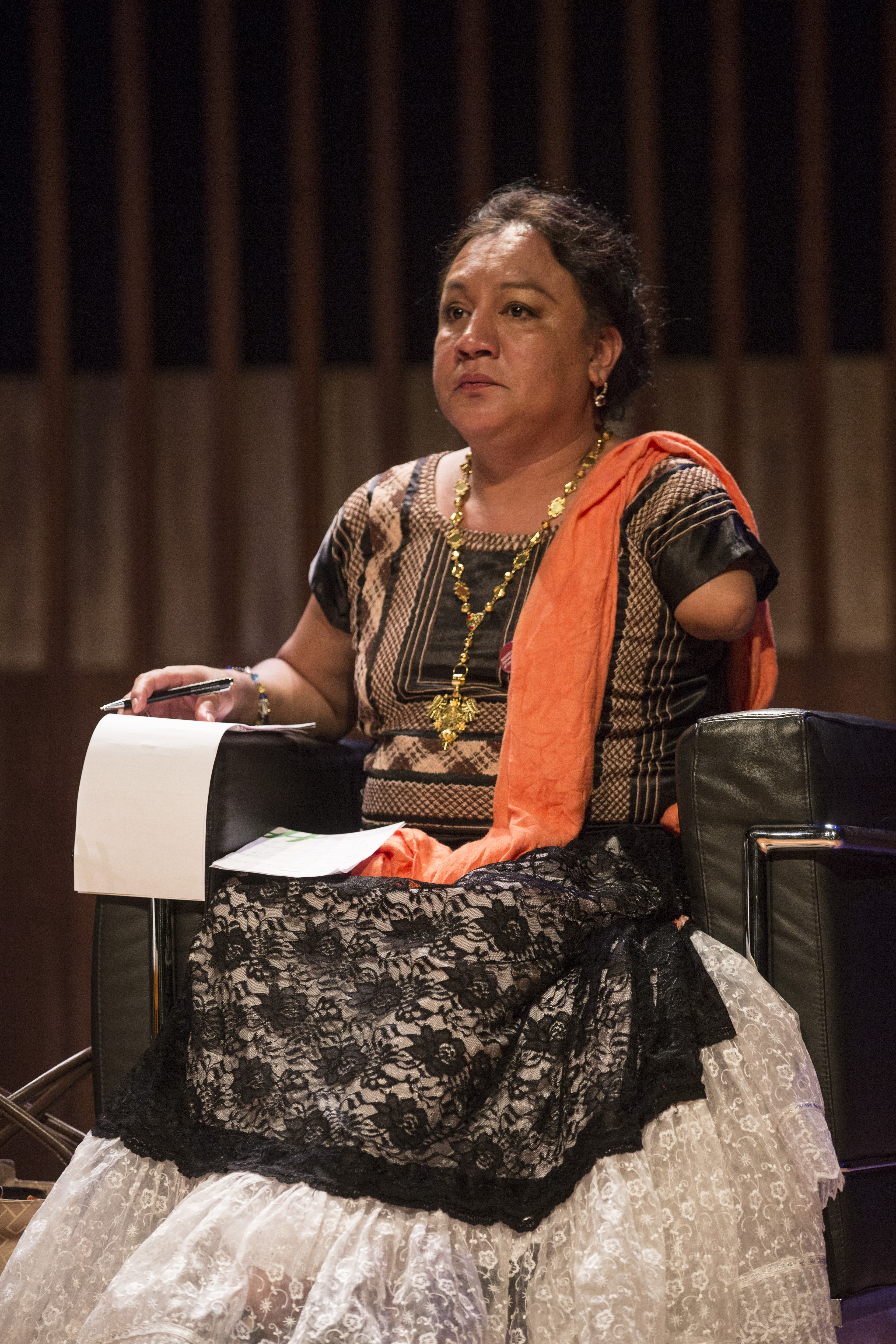 Amaranta Gómez Regalado en la mesa "Alerta que camina: Experiencias y desafíos en América Latina", realizada en el marco del evento "Nosotras Movemos el Mundo". Buenos Aires, Argentina, 7 de marzo de 2020.